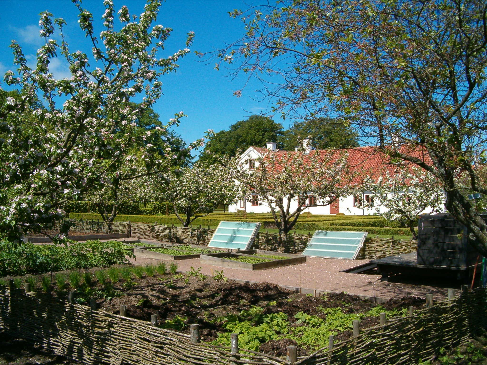 Fruktträdgården på Fredriksdals Museer och Trädgårdar med en av Herrgårdens flyglar i bakgrunden.